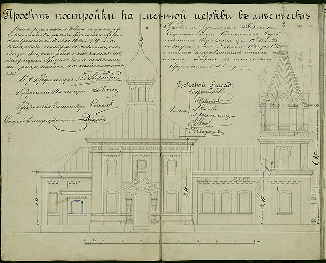 Беларуская (тарашкевіца): Рось (Roś). Царква-мураўёўка